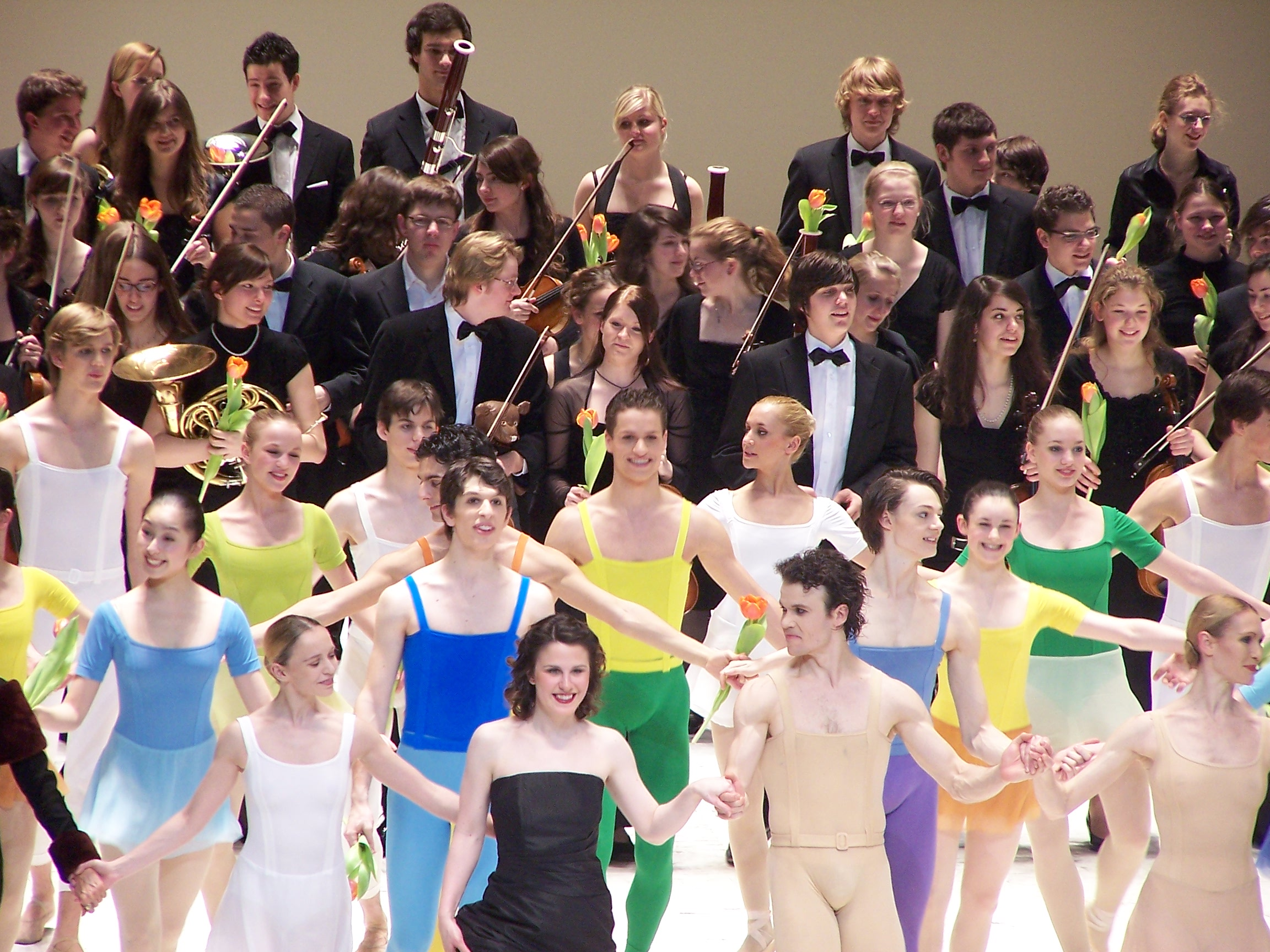 Das Hamburg Ballett und das BJO in der Laeiszhalle Hamburg, 2008